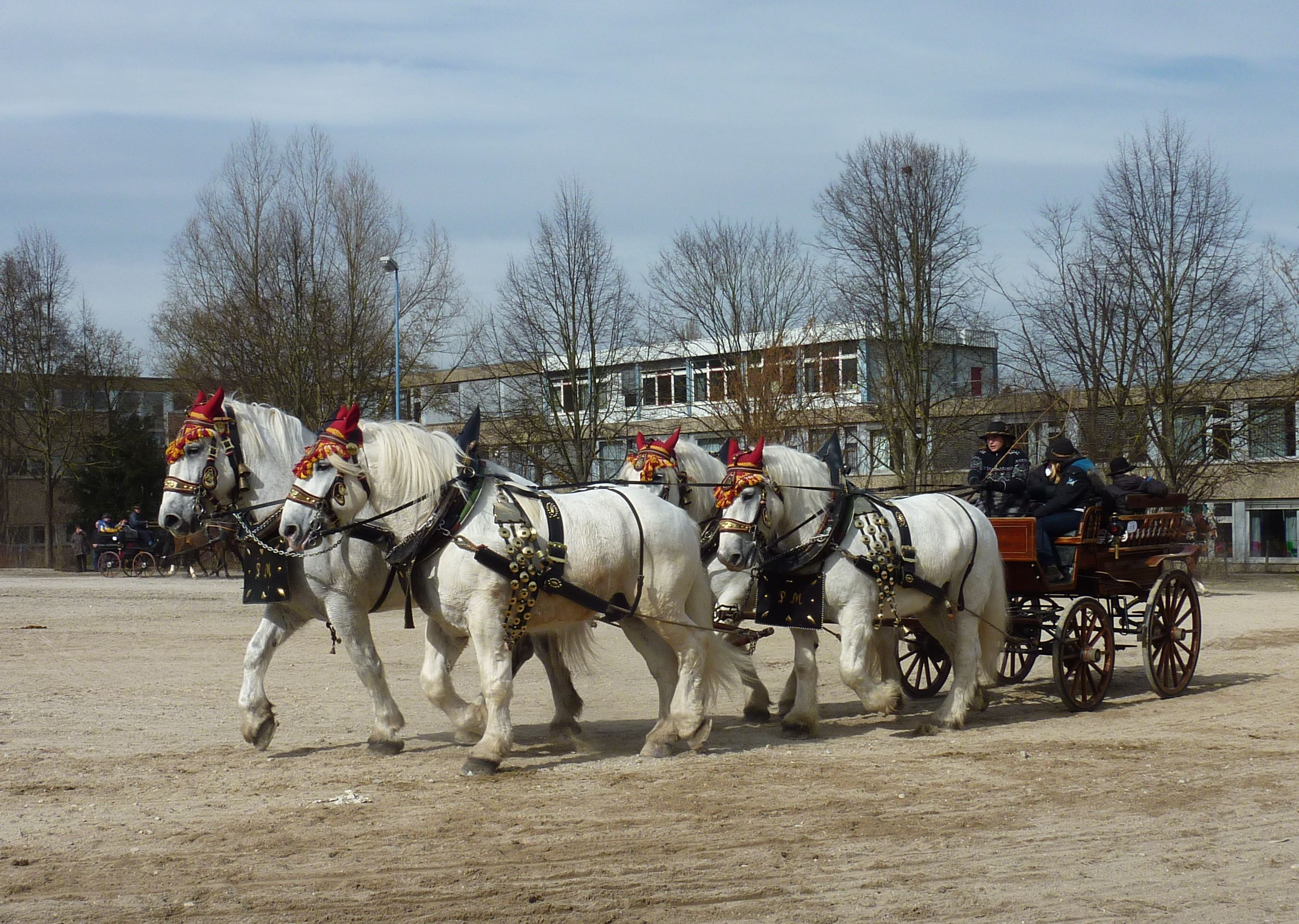 Pferdemarkt in Bernhausen am 7. März 2015